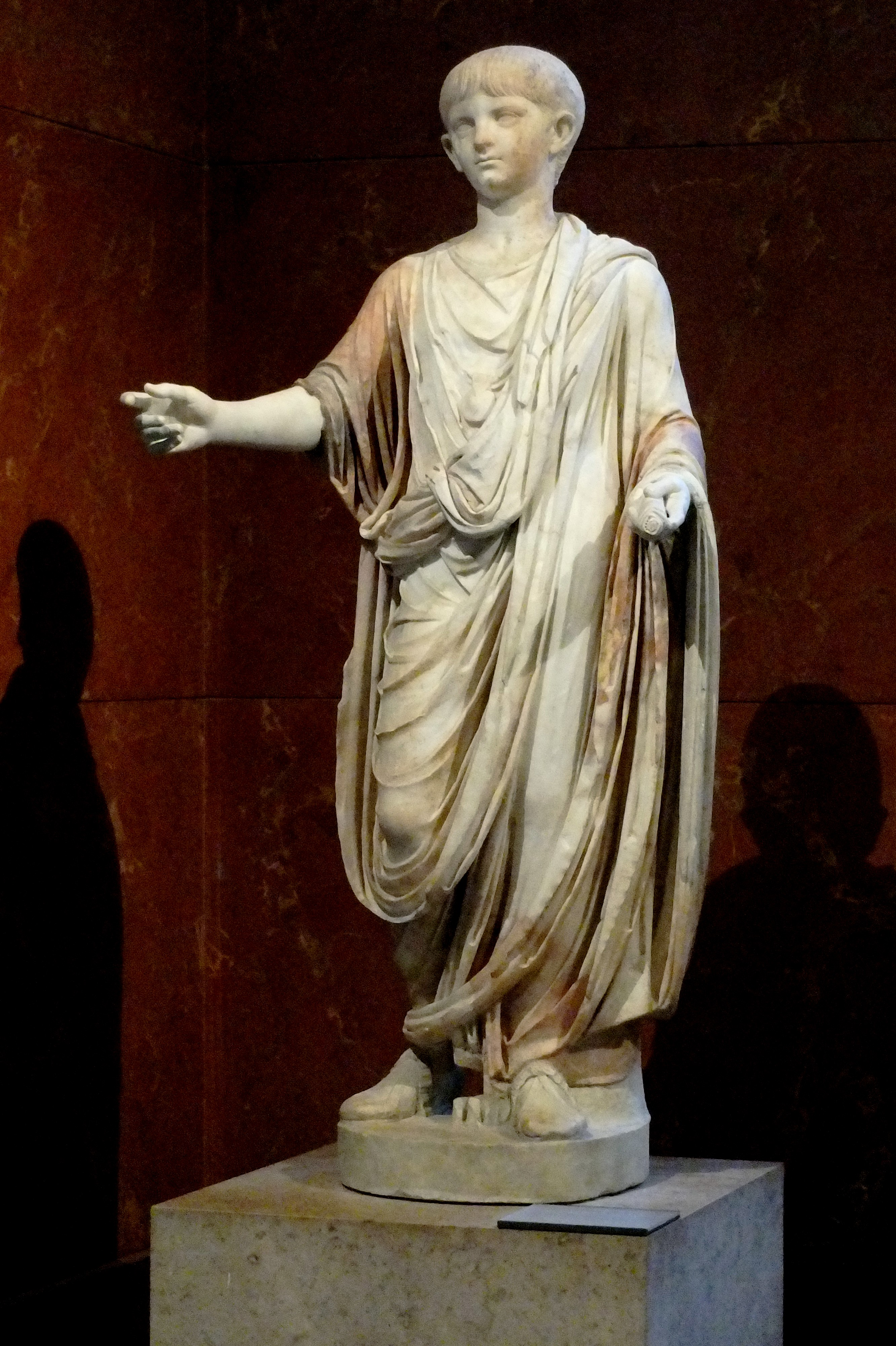 Néron enfant, marbre (env 1,30m), vers 50 ap.JC. - Ancienne collection Borghèse acahat de 1807. Musée du Louvre n°INV MR 337 / MA 1210